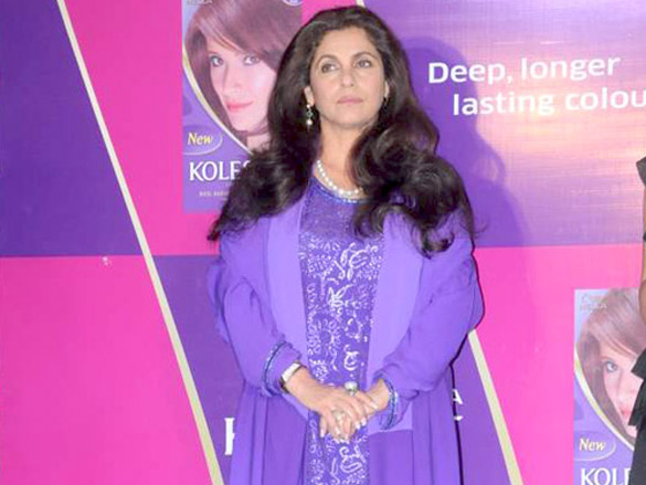 Dimple Kapadia at KOLESTINT launch